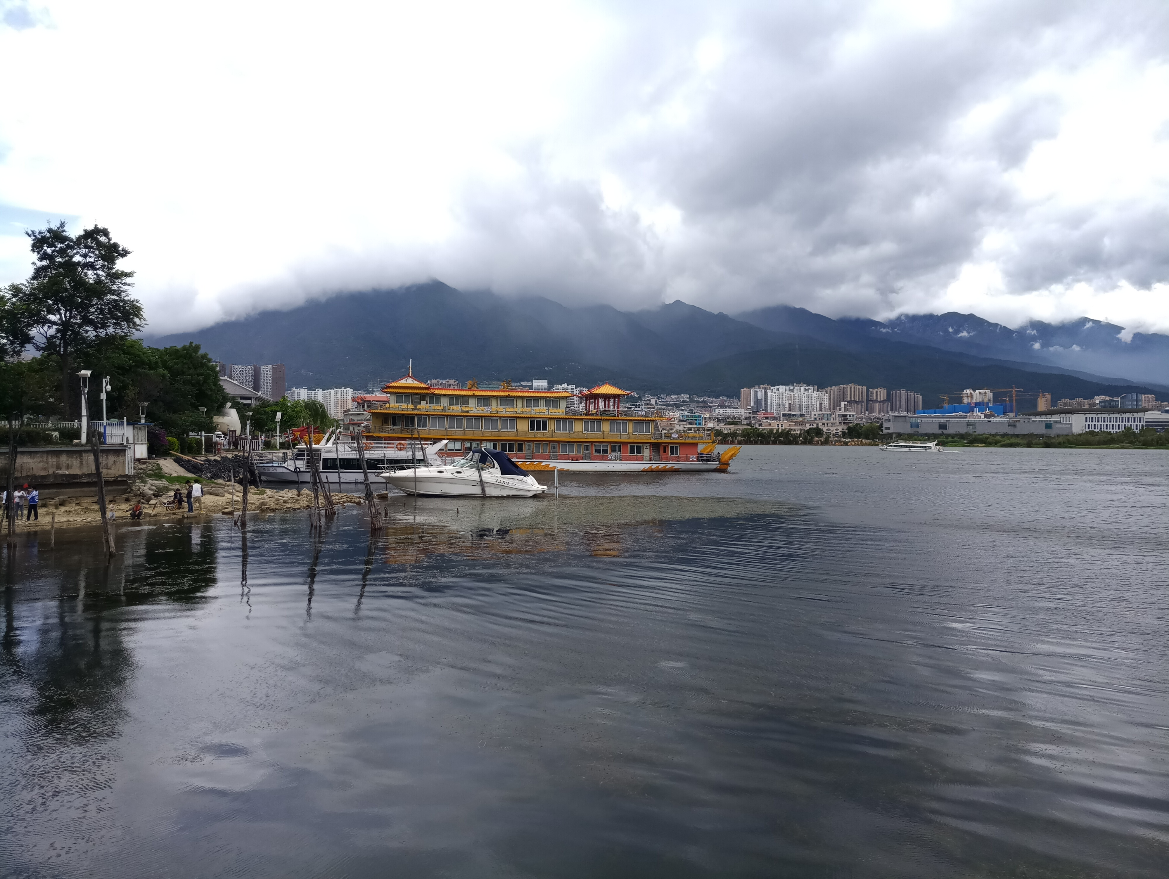 中文（中国大陆）: 洱海-大理港下关码头